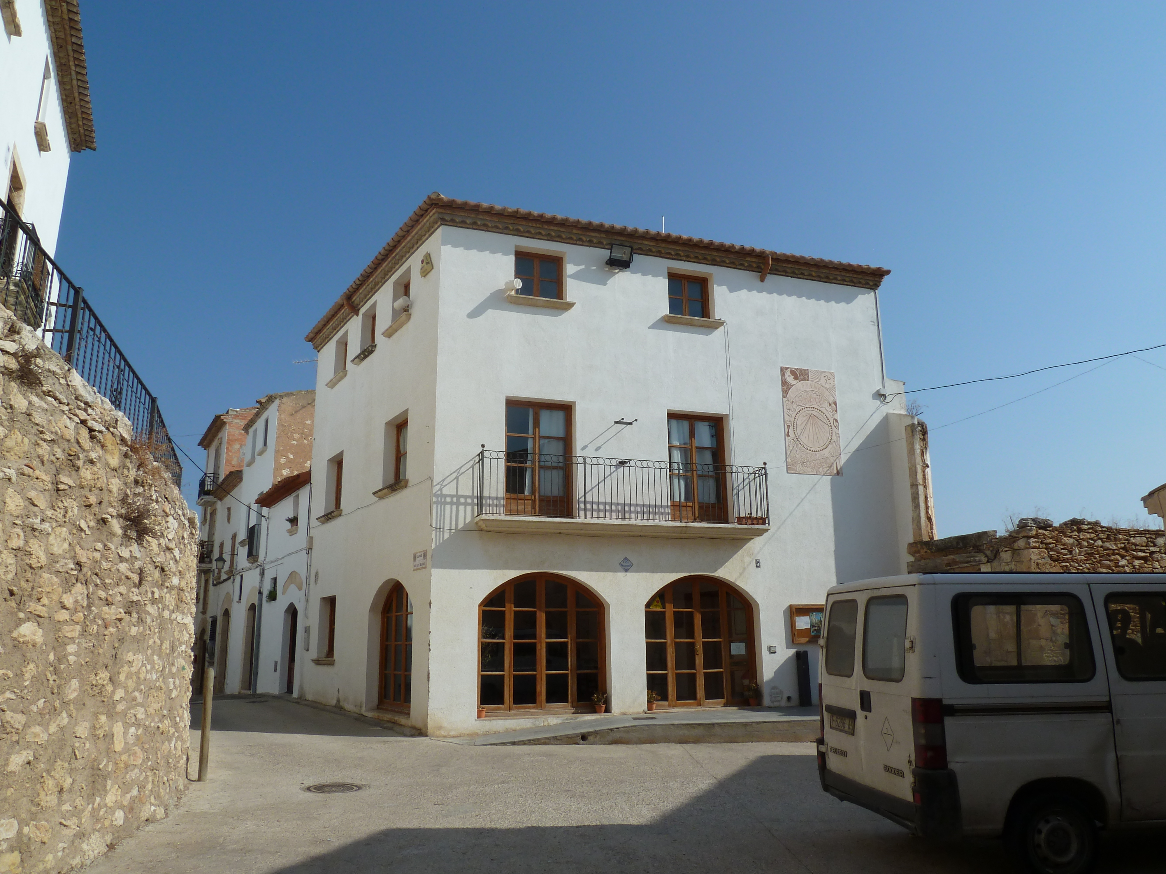 Ubicació Castell de Sant Vicenç de Calders